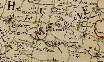 Kaart of landtafereel der provincie van Groningen en Ommelanden verdeelt in deszelfs byzondere quartieren, districten en voornaamste iurisdictien : beneffens de Heerlykheid Westerwolde